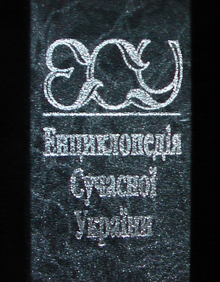 Корінець Енциклопедії сучасної України